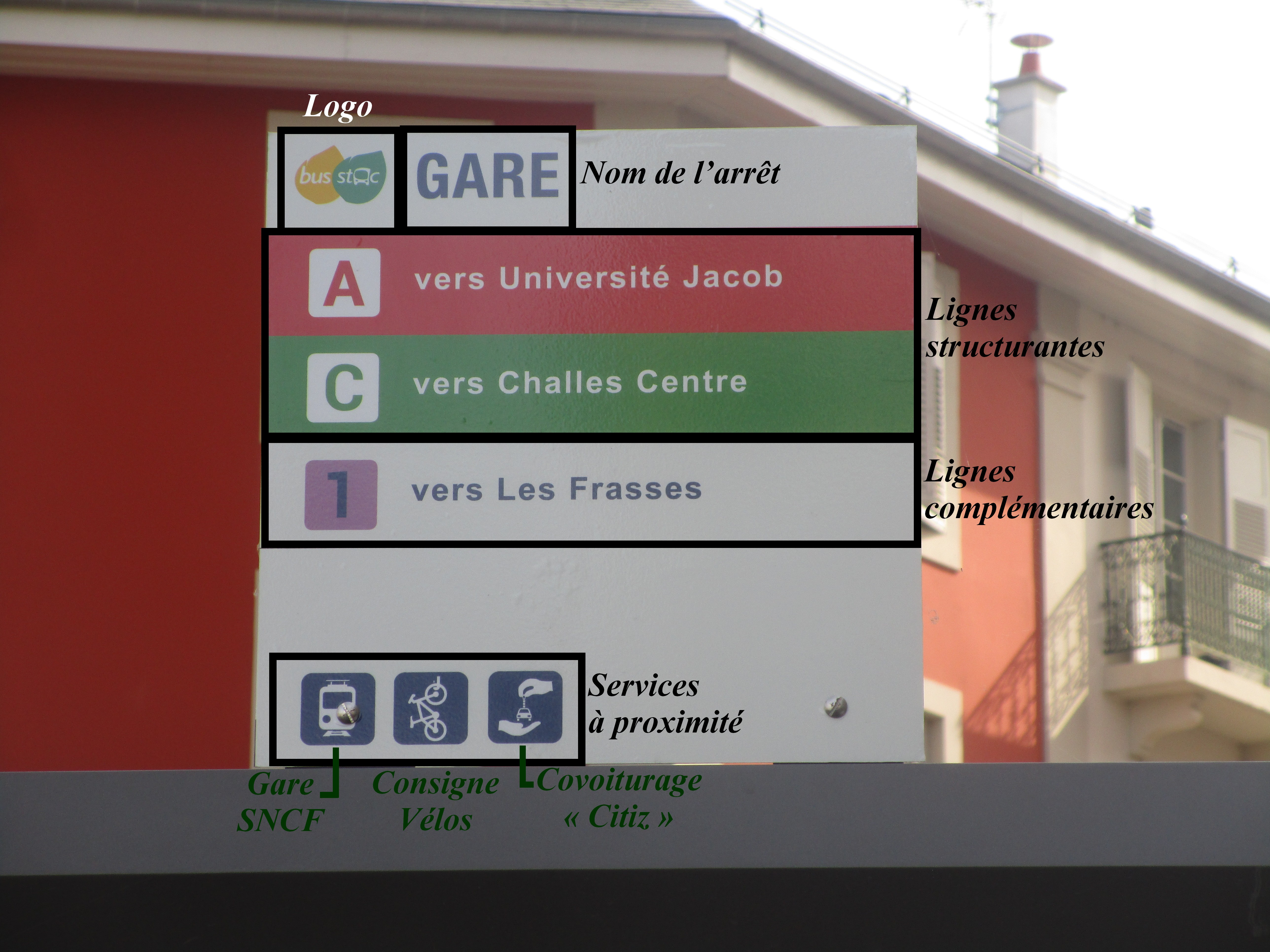 La plaque de l’arrêt de bus Gare (explicitée) à Chambéry le 23 mars 2017.